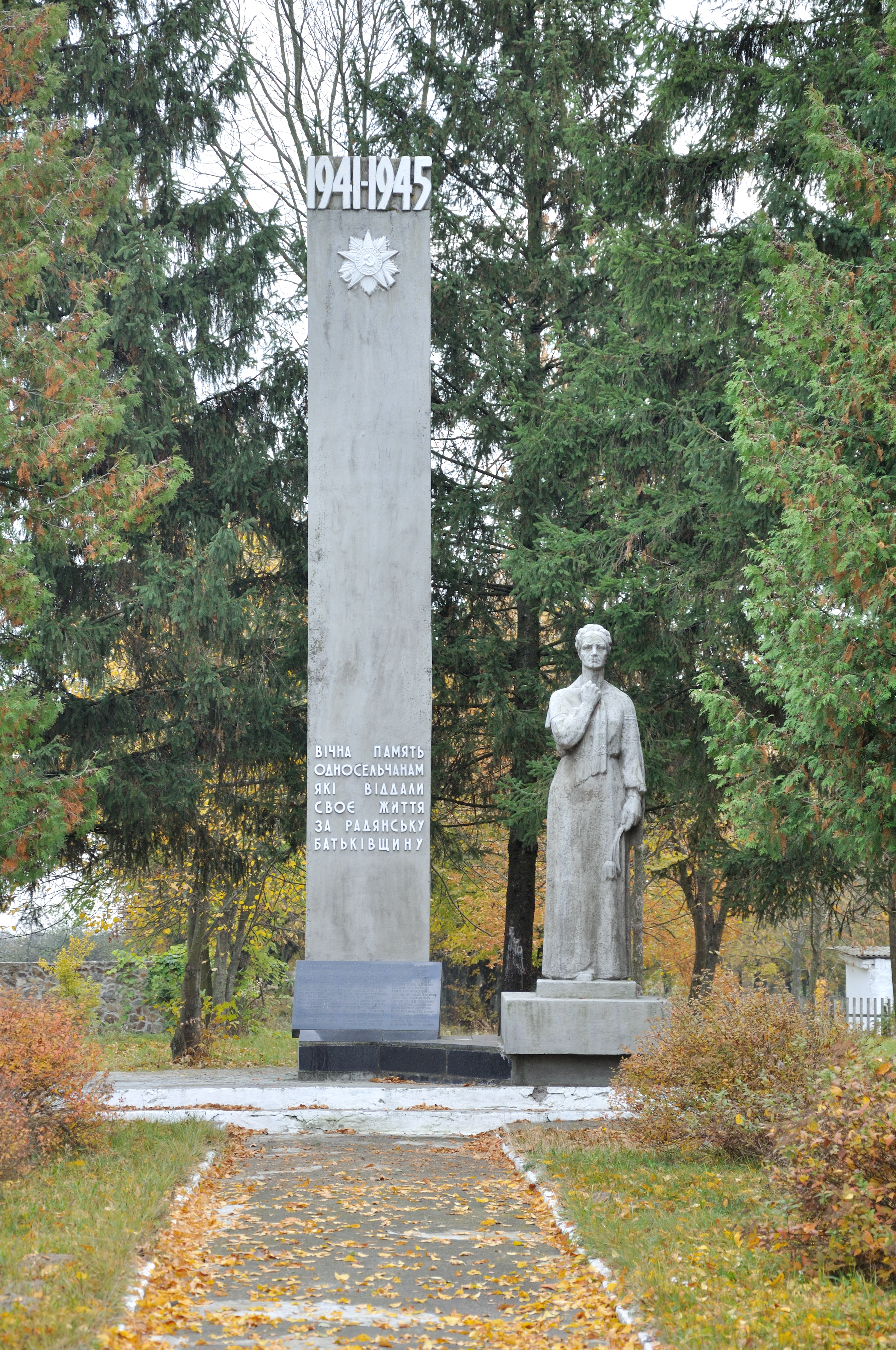 Пам’ятник воїнам-односельчанам, с. Кам’янка